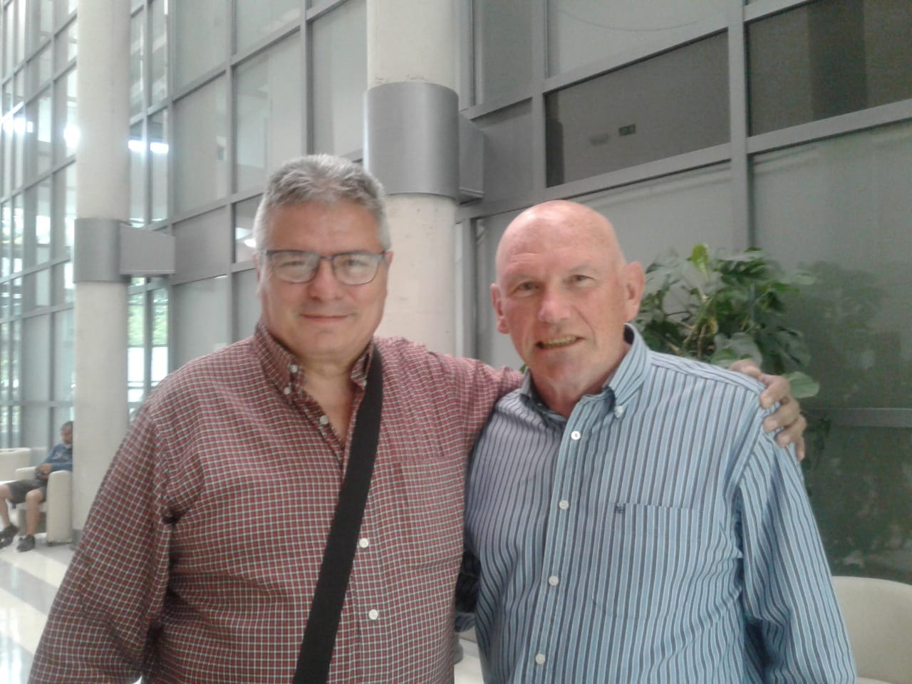 Argazkia 2019 atera zen.